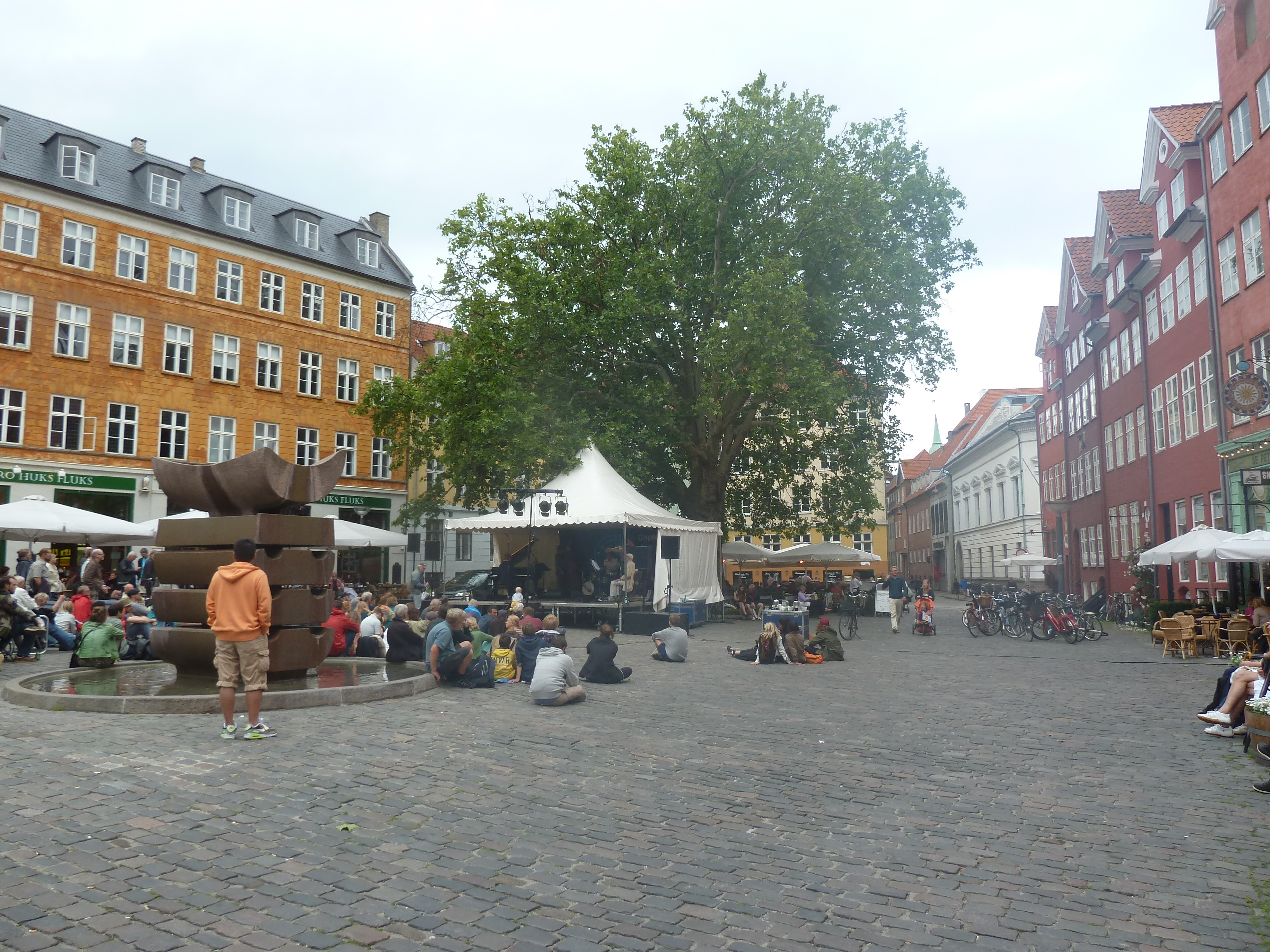 The square Gråbrødretorv in Indre By in Copenhagen.